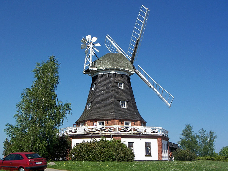 Galerieholländer in Klütz